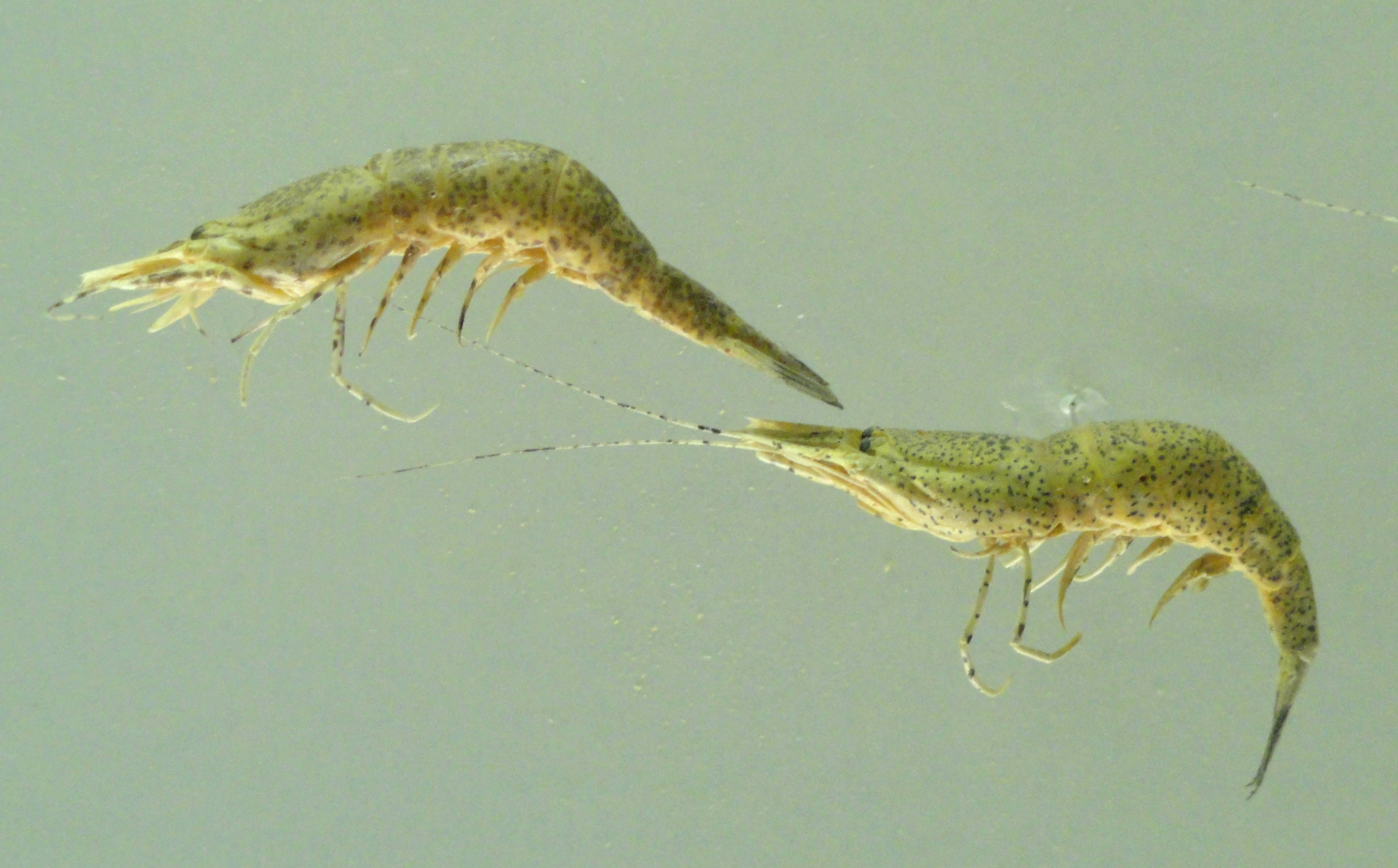 Exhibit in Naturmuseum Senckenberg, Frankfurt am Main, Germany.